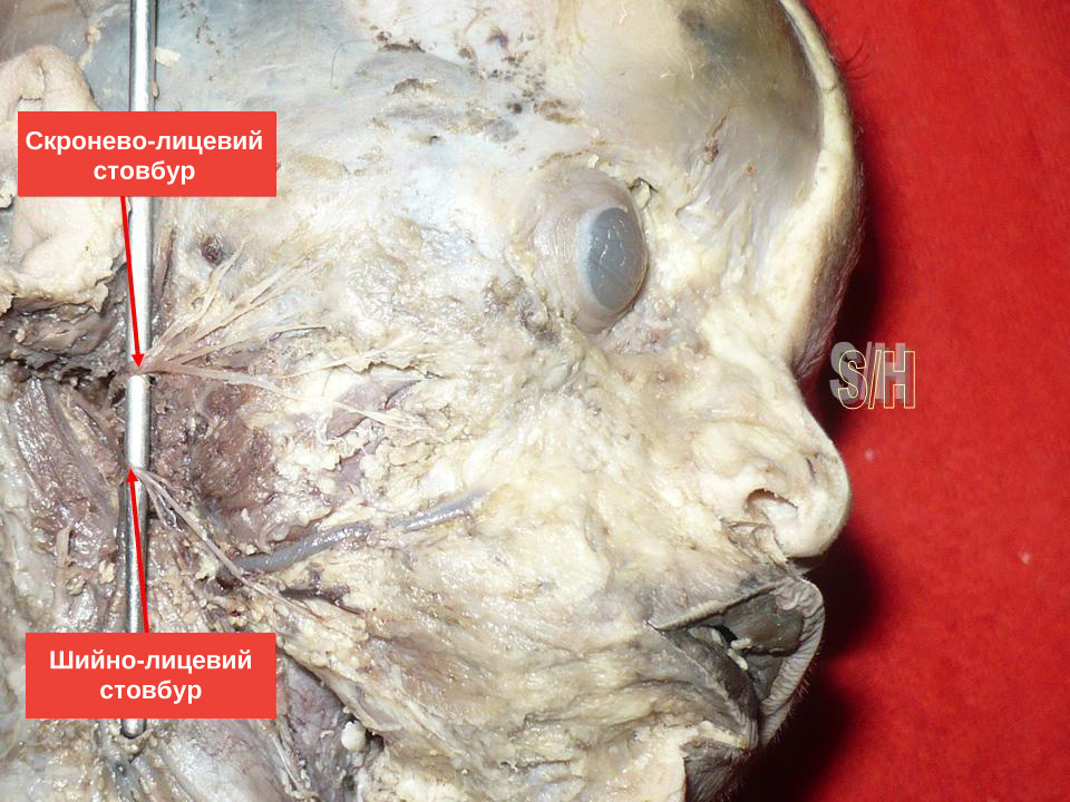 Лицевий нерв ембріона людини